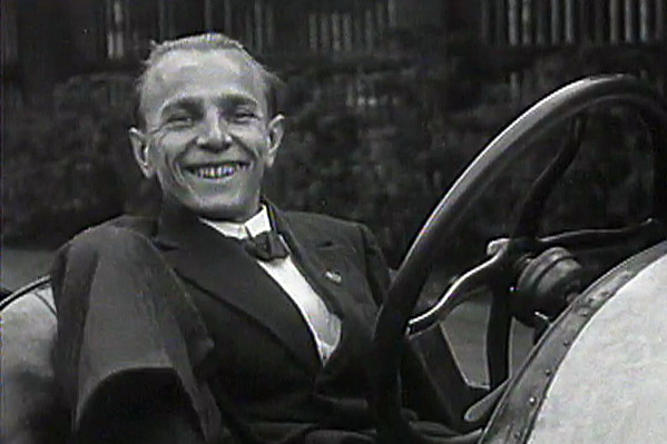 František Filip (1904 – 1957) byl český tělesně postižený spisovatel.